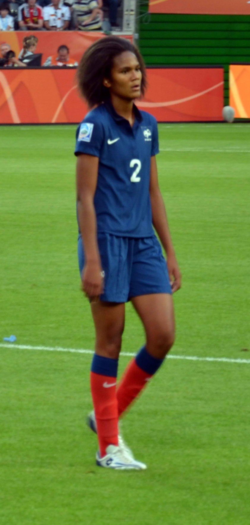 Wendie Renard - Match de phase de groupes de la coupe du monde entre la France et l'Allemagne le 5 juillet 2011 au Borussiapark de Mönchengladbach